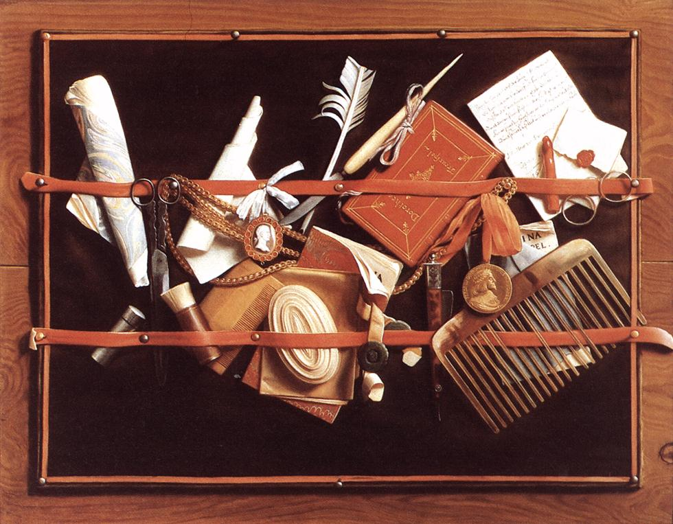 tromp l'oeil